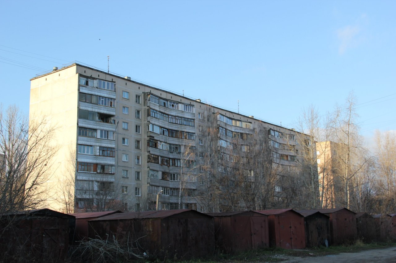 Панельный дом серии 1-515ш (ЮЛ)